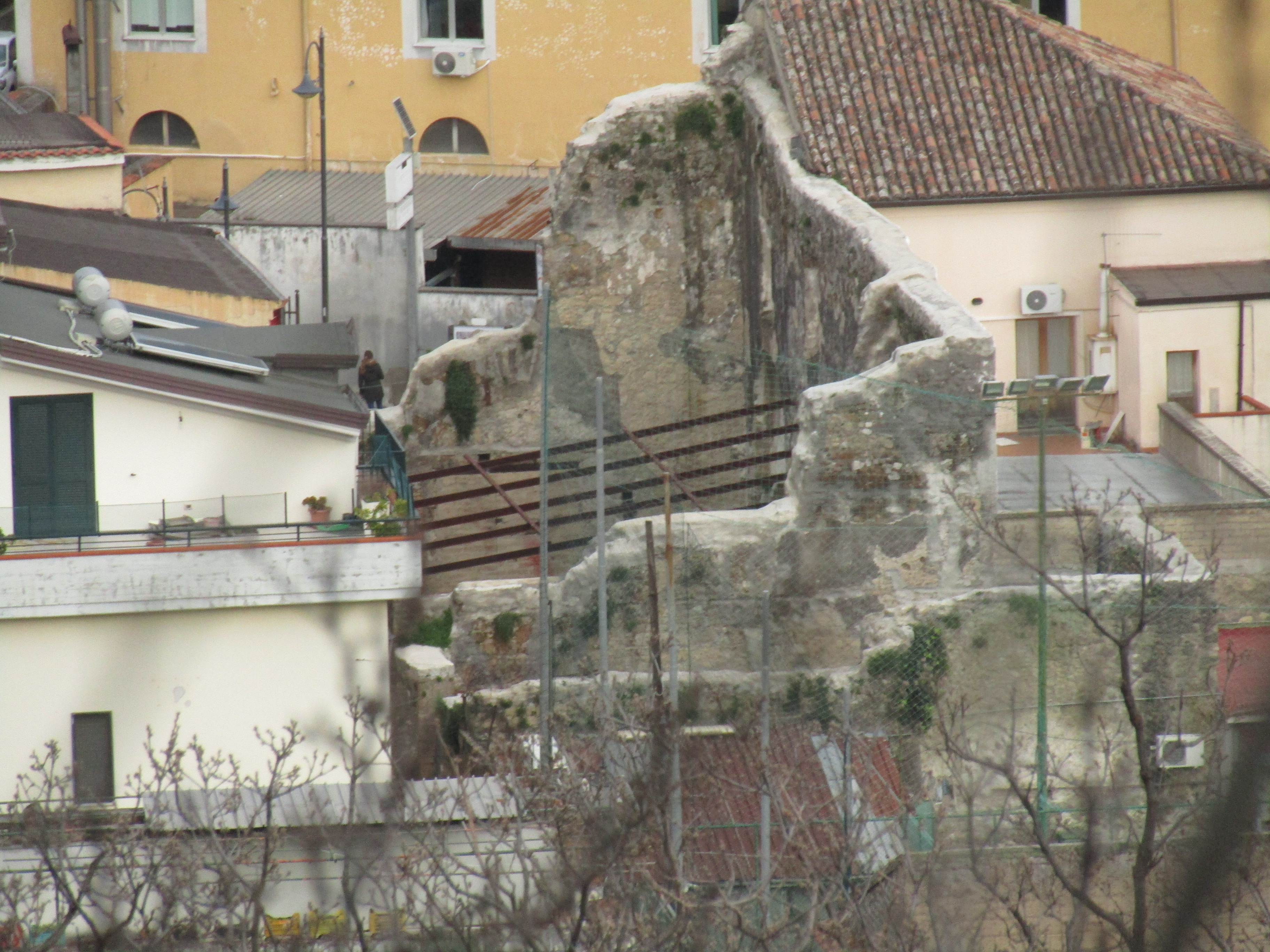 Rudere dell'antica chiesa di San Bartolomeo, Nocera Inferiore, Italia |Source=Mariano Rocco |Author=Mariano Rocco |Date=28. feb 2019 |Permission=